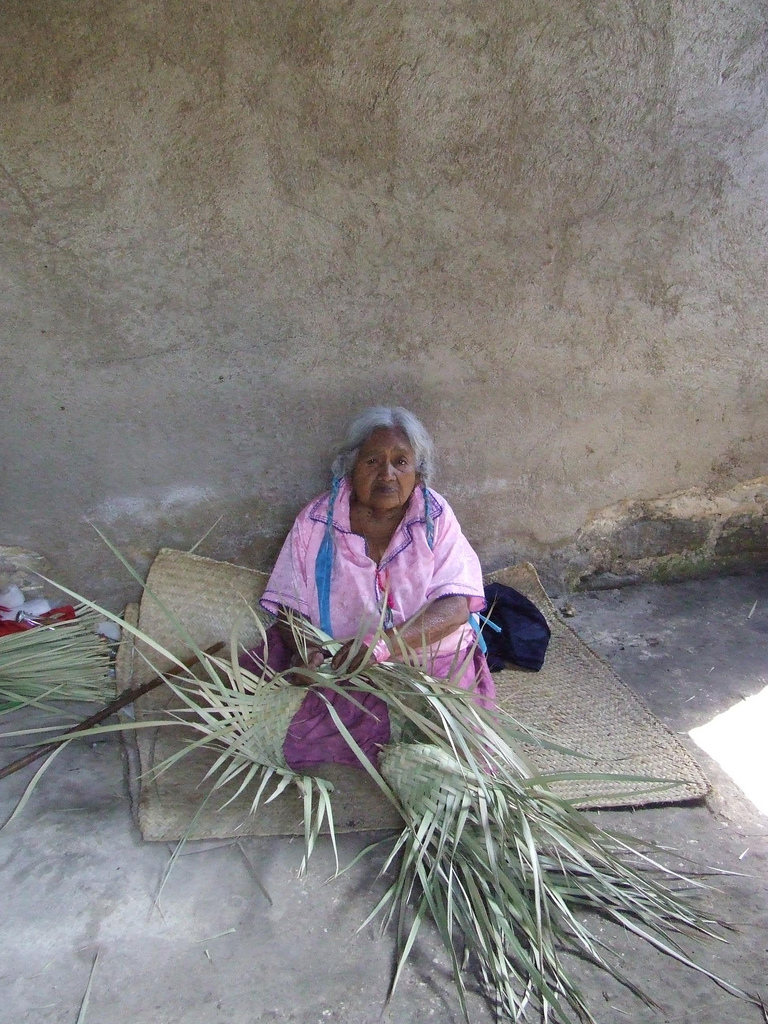 Tejiendo palma. El verdadero trabajo, lo hacen las manos desfavorecidas.